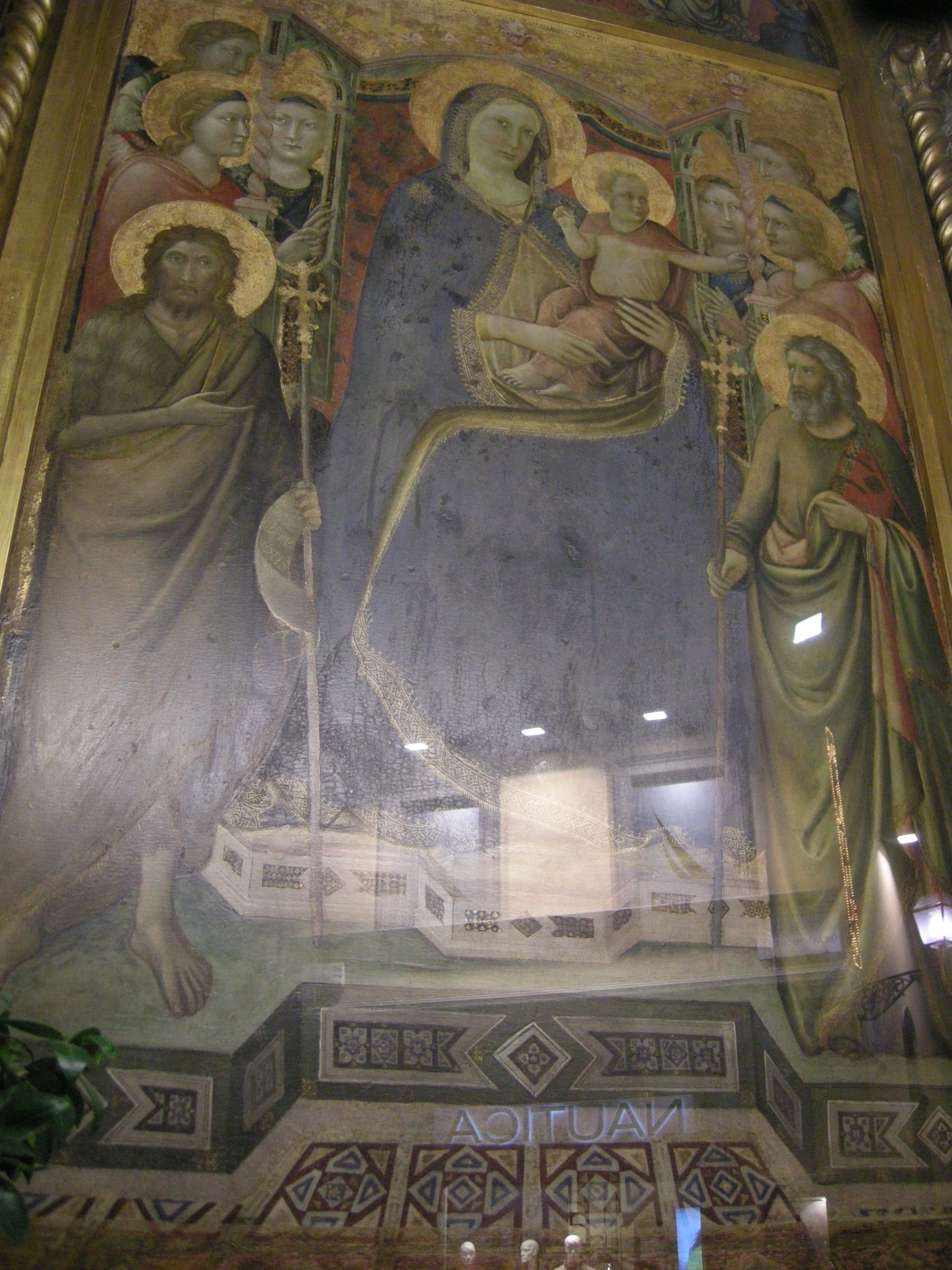 Tabernacolo di santa maria della tromba, madonna di jacopo del casentino